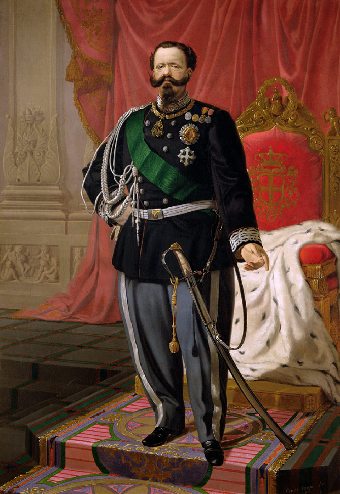 Ritratto di Vittorio Emanuele II